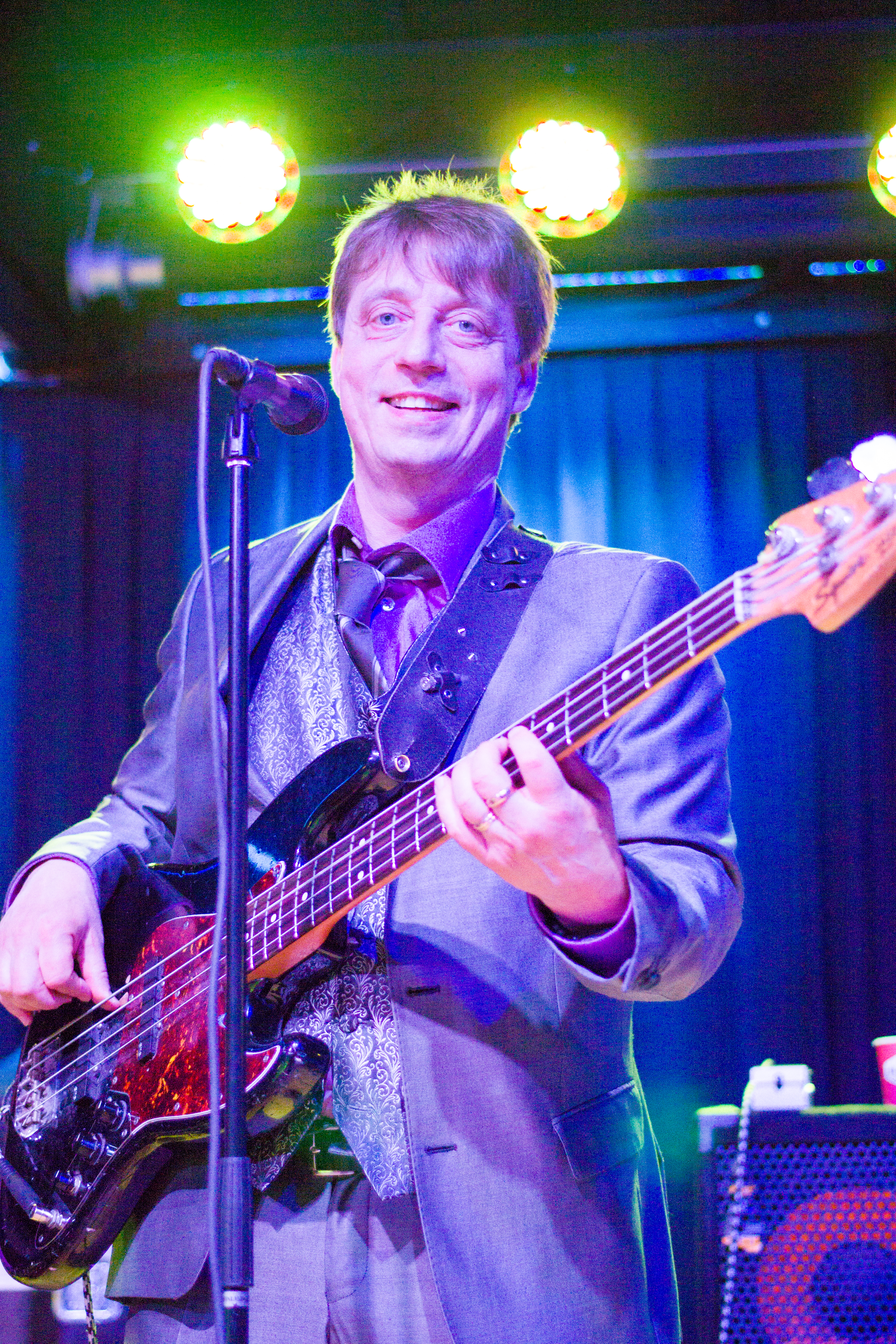 Aarne hartelin suomalainen basisti